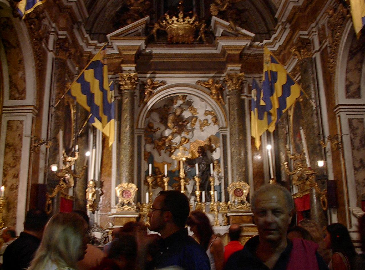 Palio di Siena Agosto '02